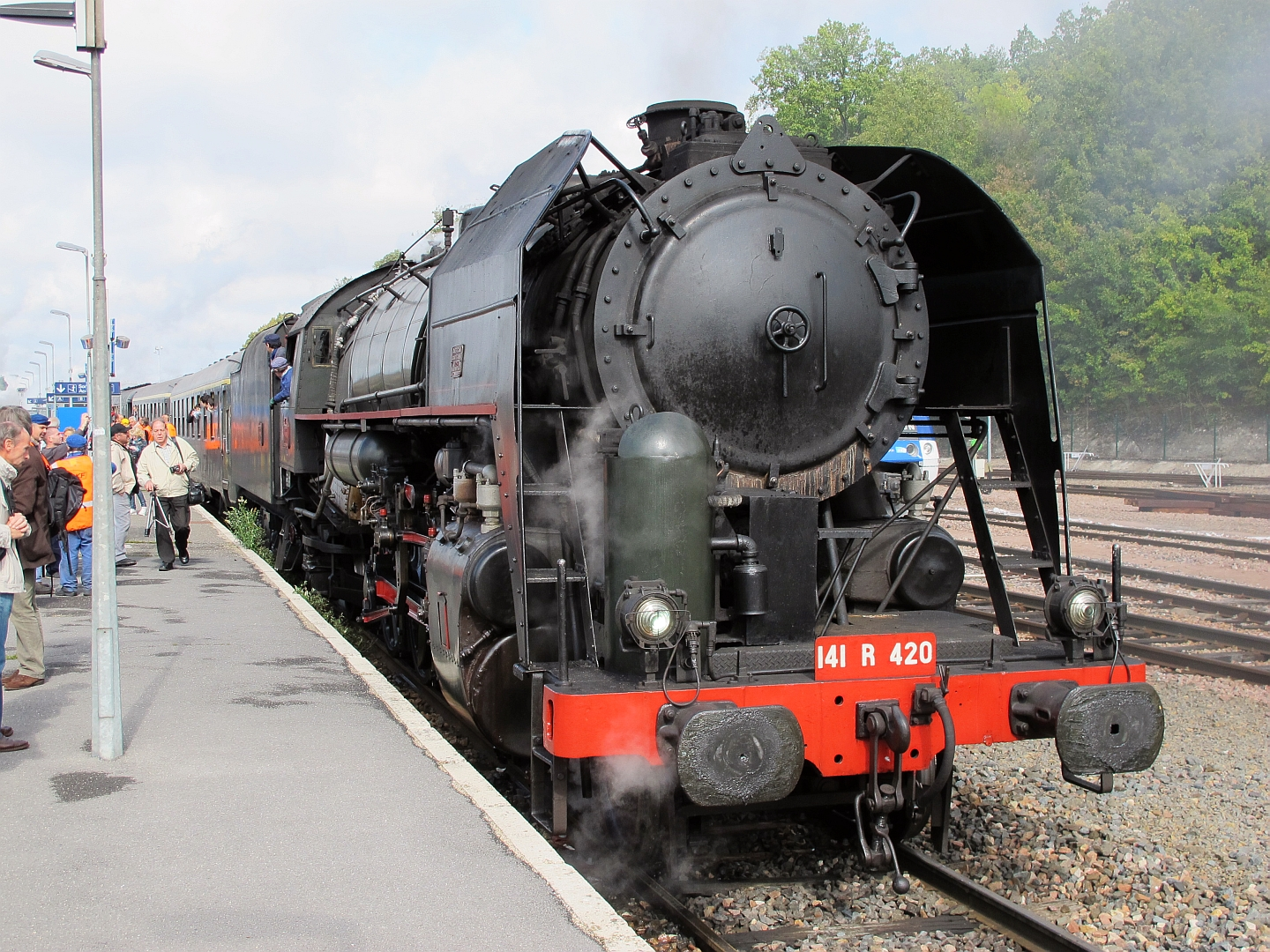 La 141 R 420 en gare de Longueville le 18 septembre 2011.